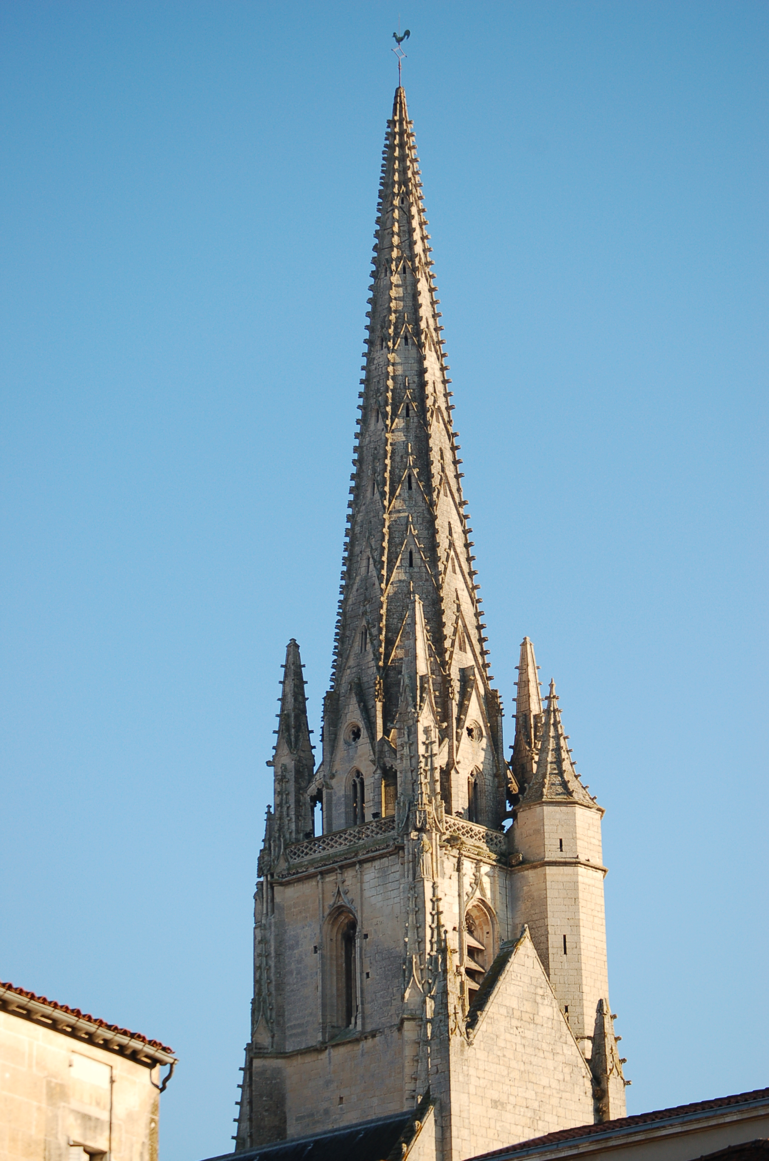 Église Notre Dame, à Niort (France - Deux-Sèvres)